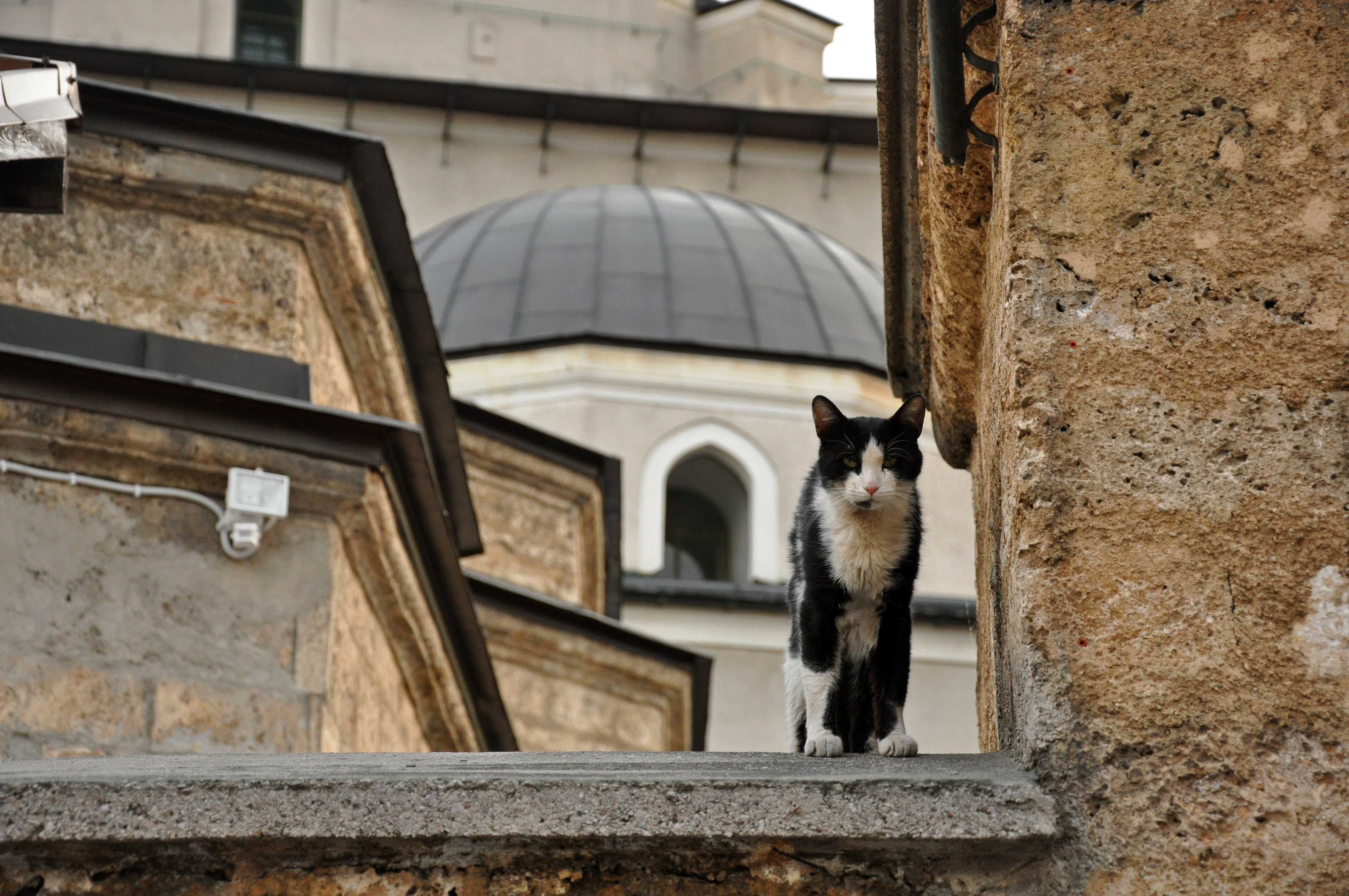 cat outside Gazi Husrev-Bey Mosque